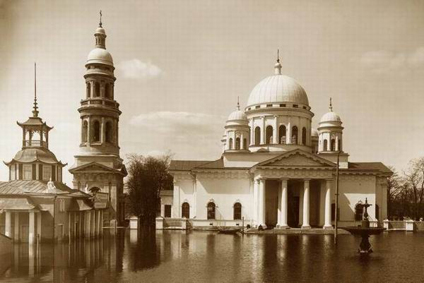 Спасо-Преображенский (Староярмарочный) собор